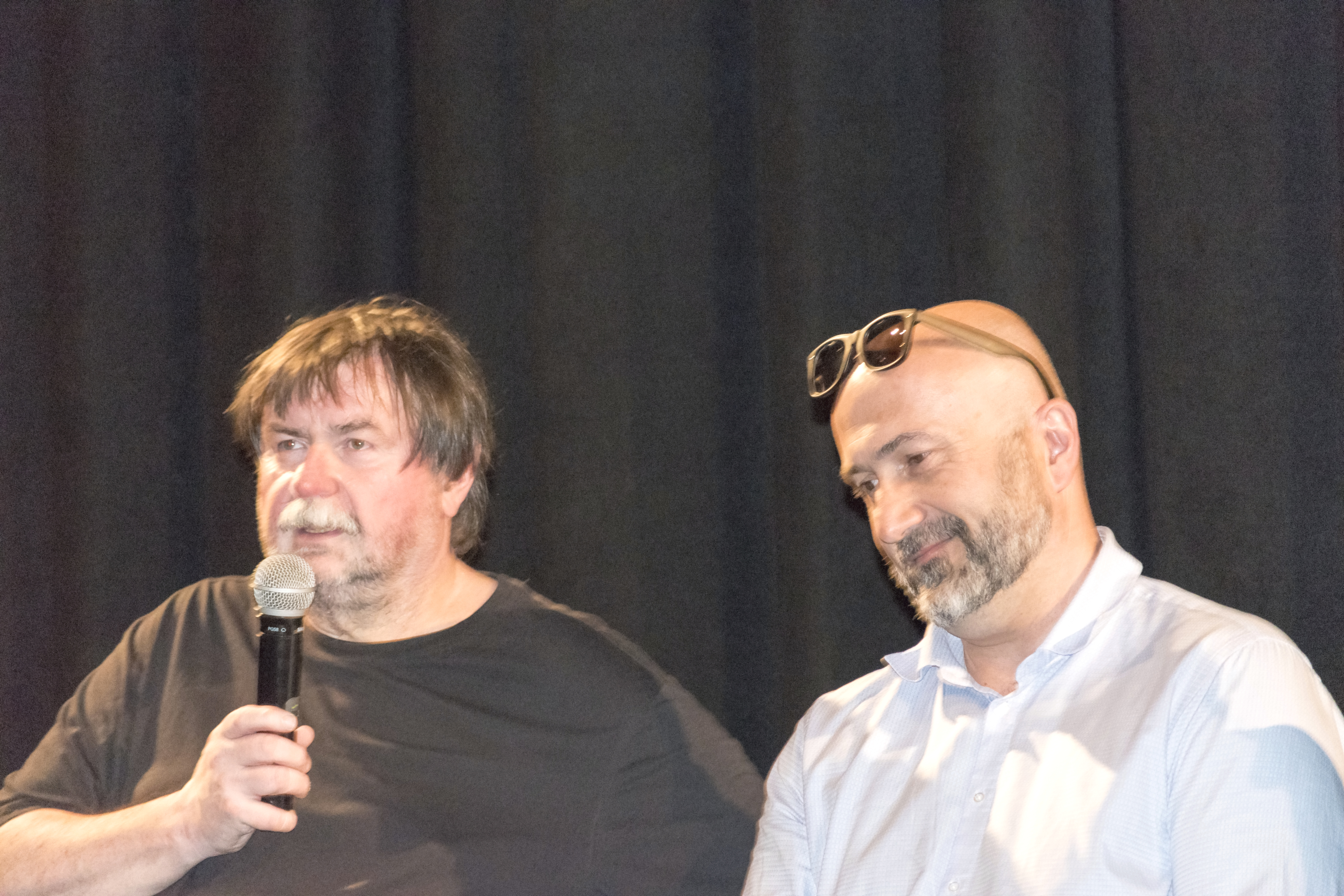 Fotky z novinářské projekce 18. 4. 2018 Autor: Blanka Borová (Karolína Černá) pro Kritiky.cz